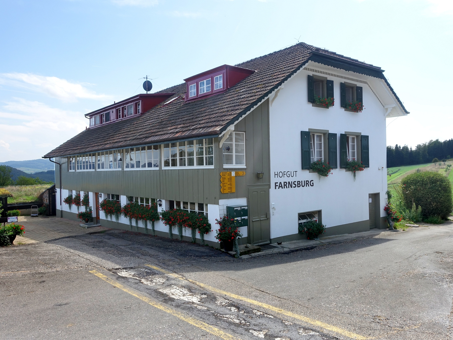 Ehemaliges Erholungsheim Farnsburg oberhalb Ormalingen. Es wurde (1943–1961) von Elisabeth Handschin (1920–1968) geführt